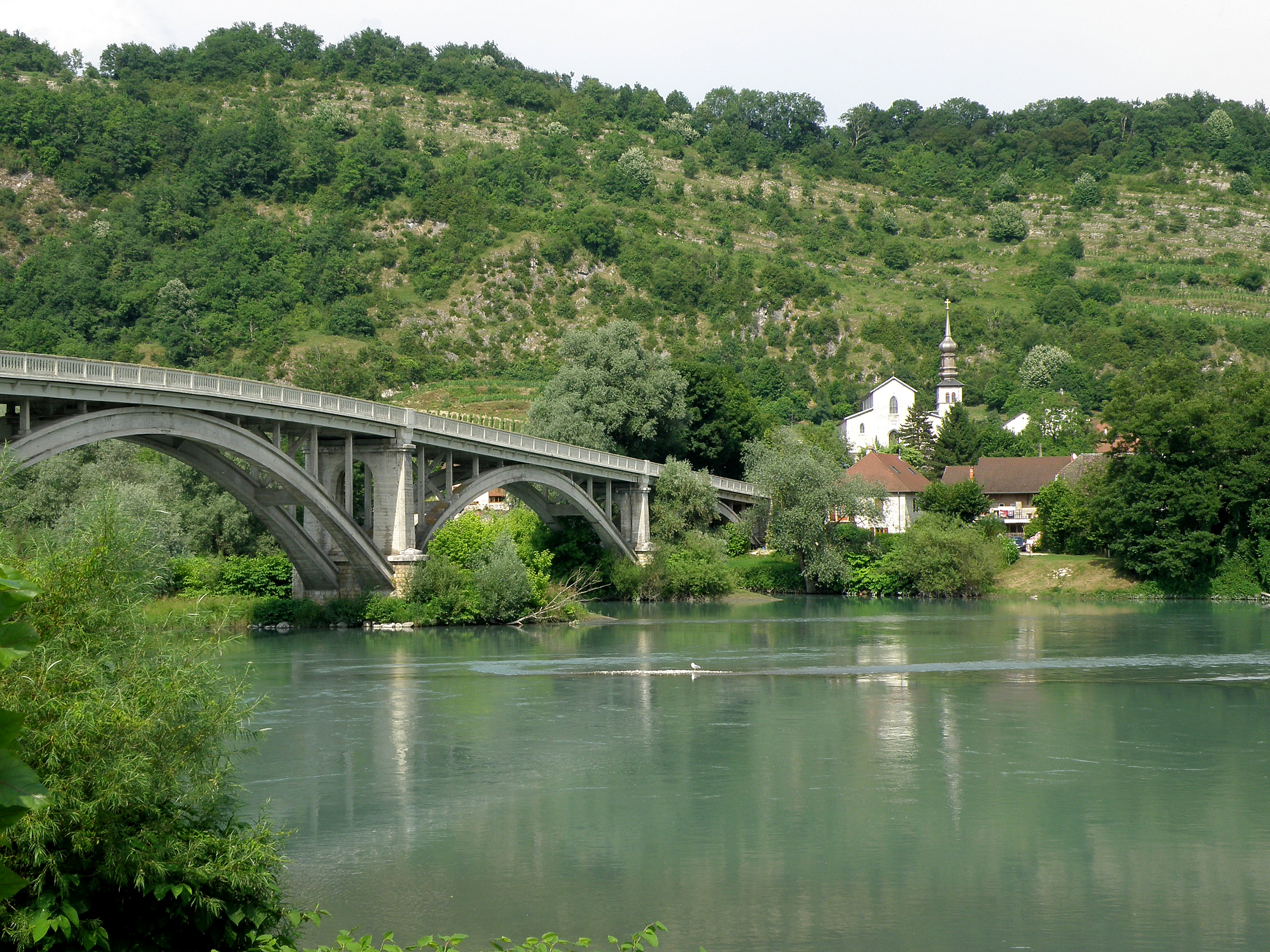 Lucey, comm. du département de la Savoie (région Rhônes-Alpes, France). Le bourg de Lucey au bord du Rhône. Pont de Lucey et église paroissiale Saint-Étienne.